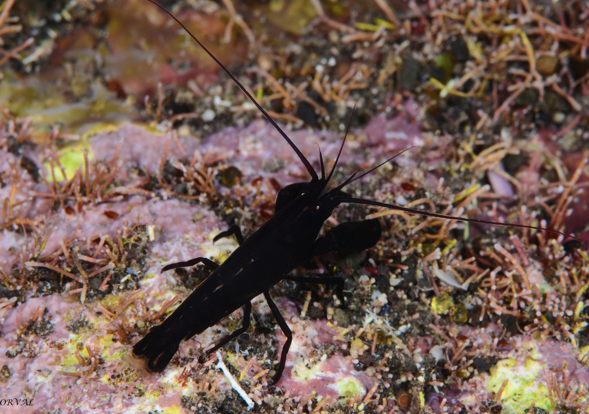 Une crevette Arete dorsalis à la Réunion.